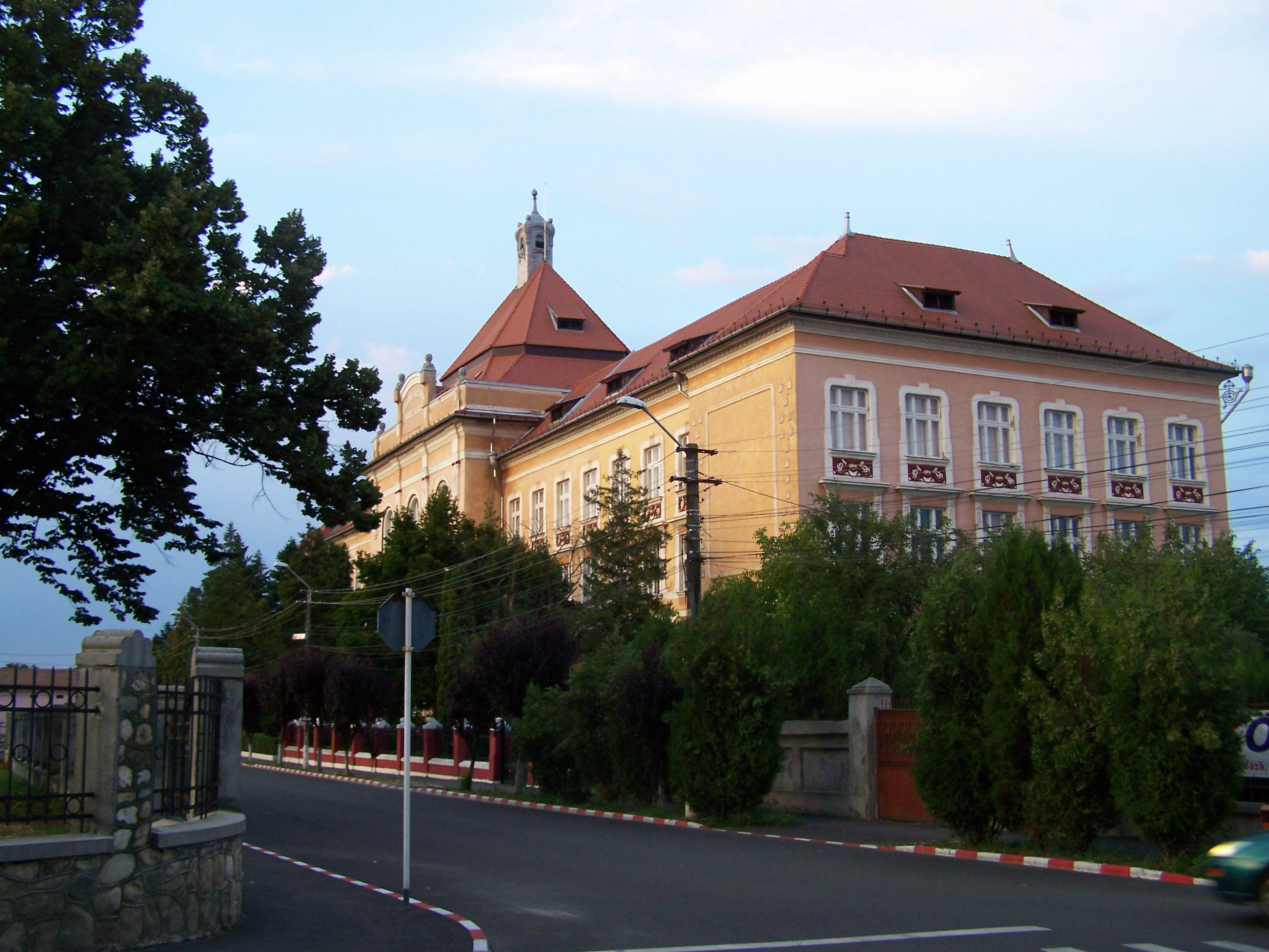 Liceul Aurel Vlaicu din Orastie, mai demult Liceul Kocsard Kun.